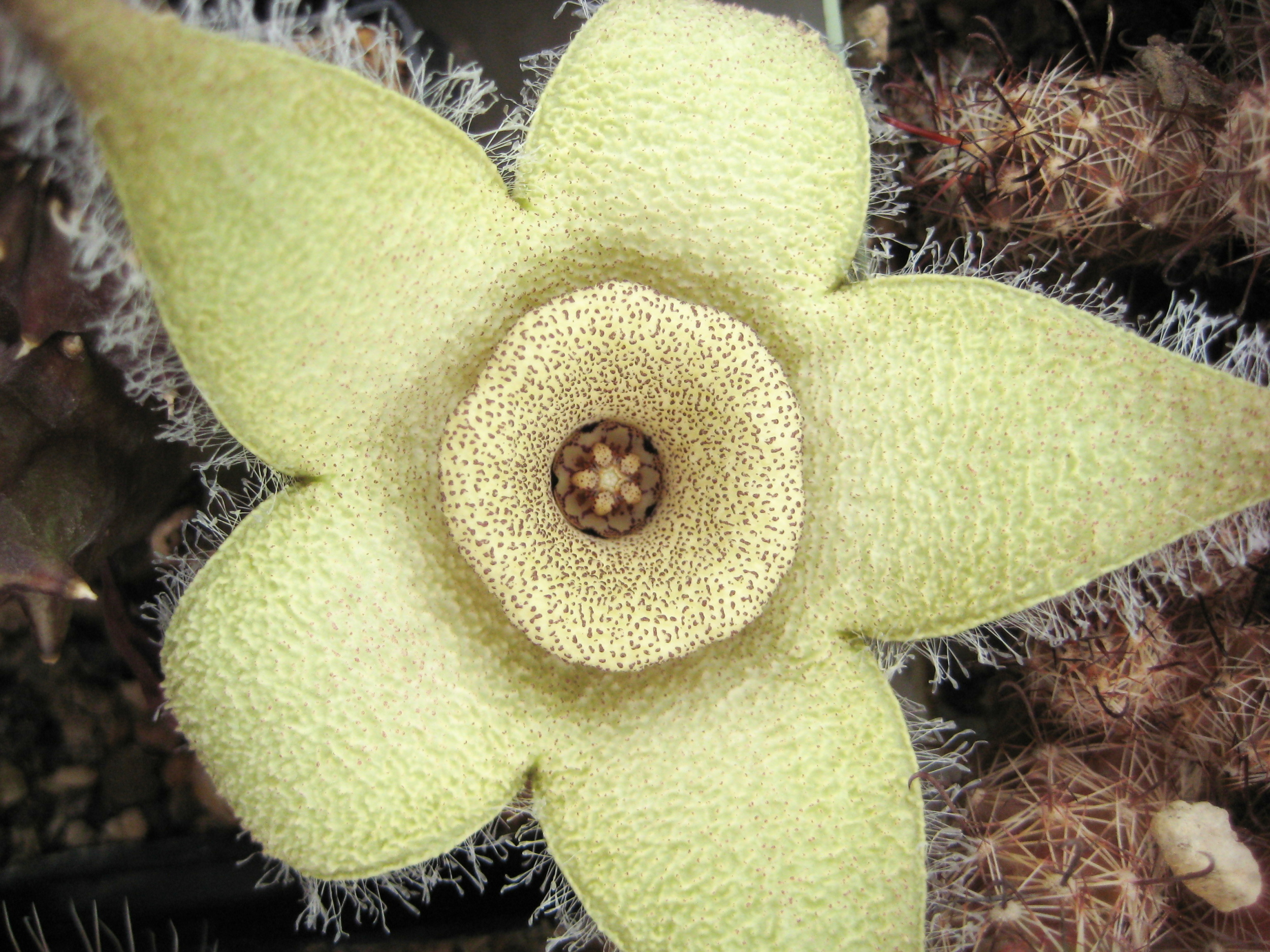 Orbea ciliata in Kultur